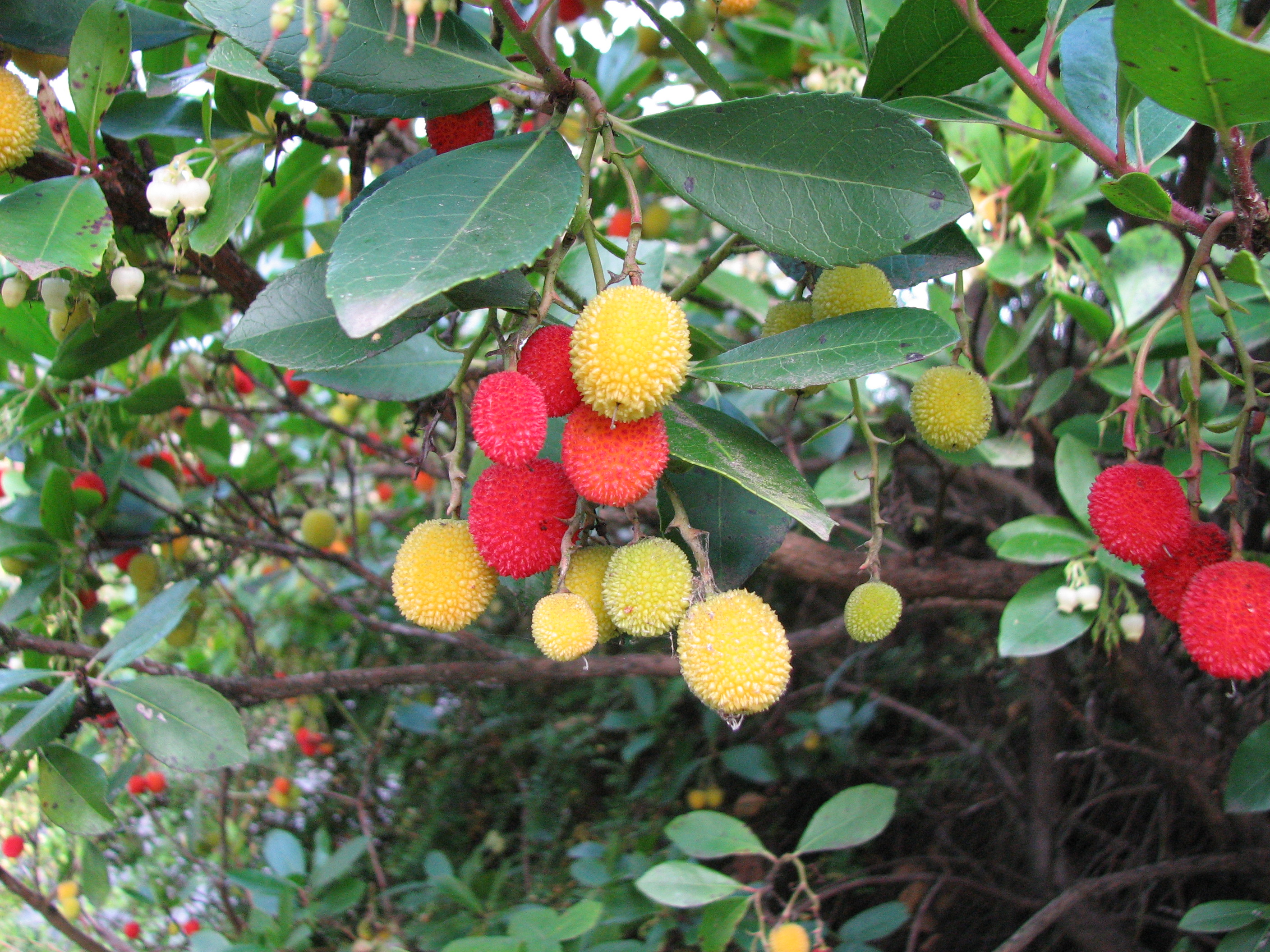 Hi-res version